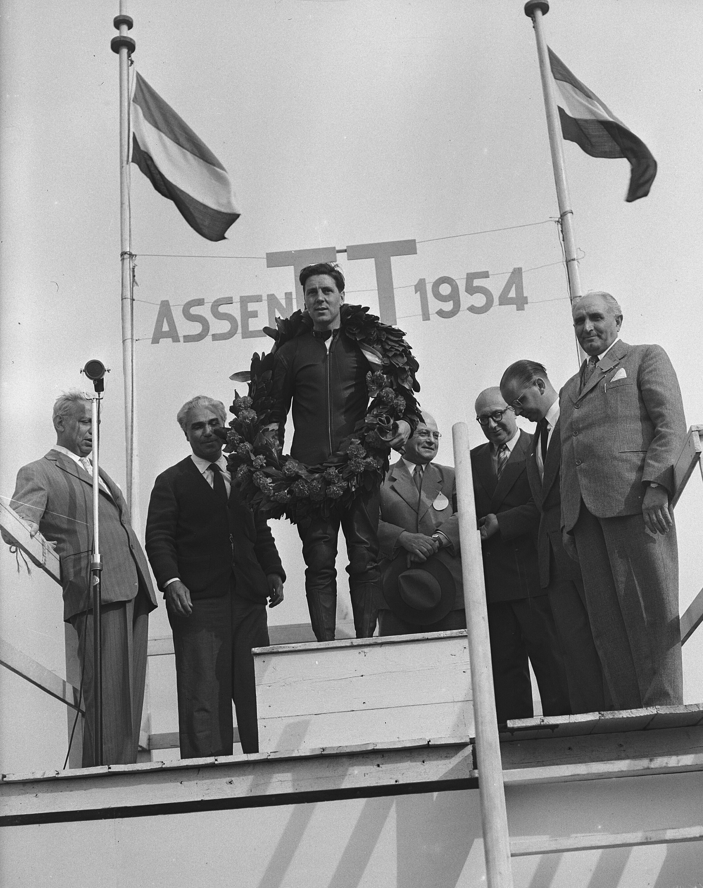 Collectie / Archief : Fotocollectie Anefo Reportage / Serie : [ onbekend ] Beschrijving : TT races Assen , Werner Haas op podium Datum : 10 juli 1954 Trefwoorden : podia Persoonsnaam : Haas, Werner Fotograaf : Bilsen, Joop van / Anefo Auteursrechthebbende : Nationaal Archief Materiaalsoort : Glasnegatief Nummer archiefinventaris : bekijk toegang 2.24.01.09 Bestanddeelnummer : 906-5873